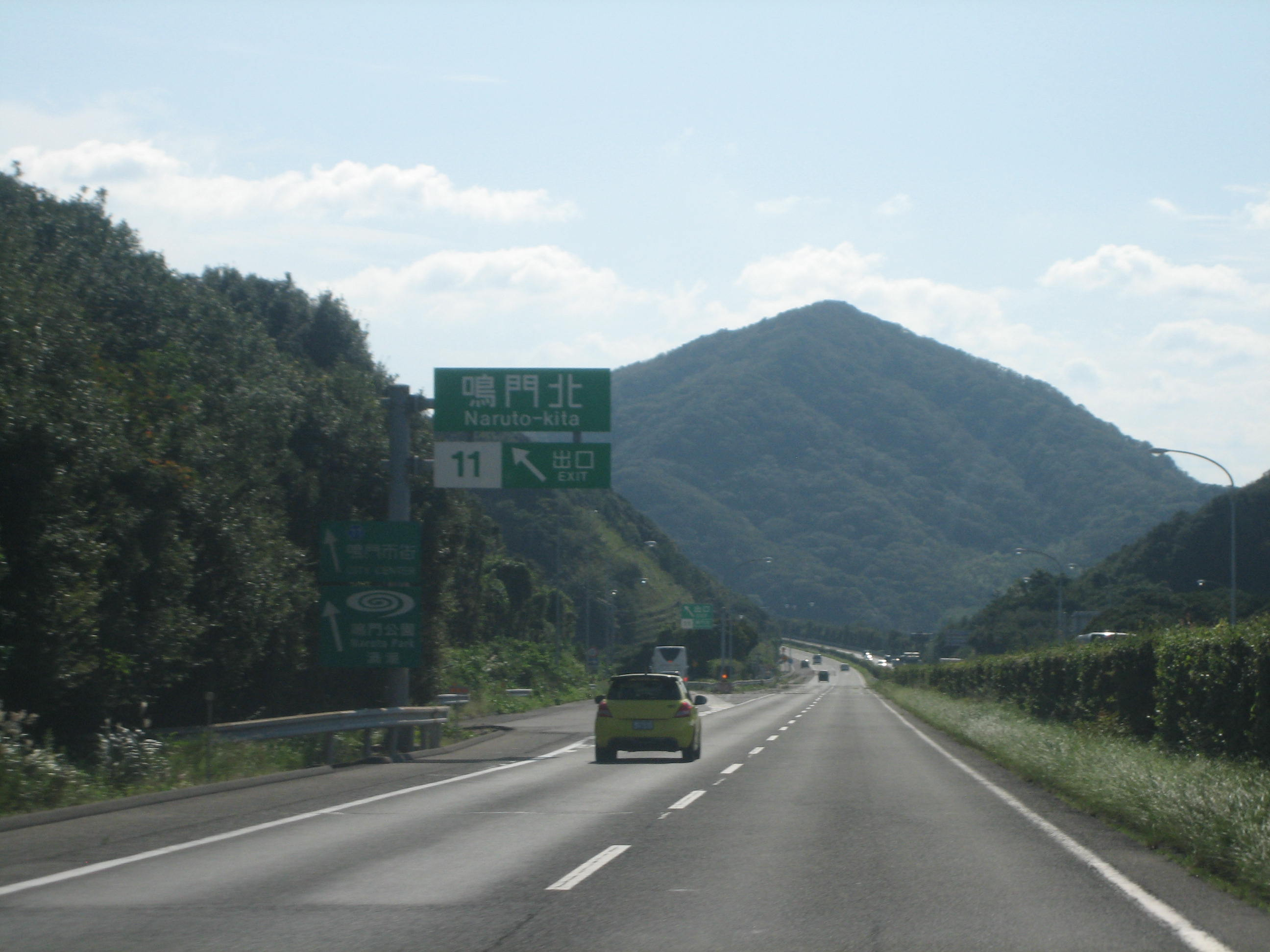 鳴門北IC